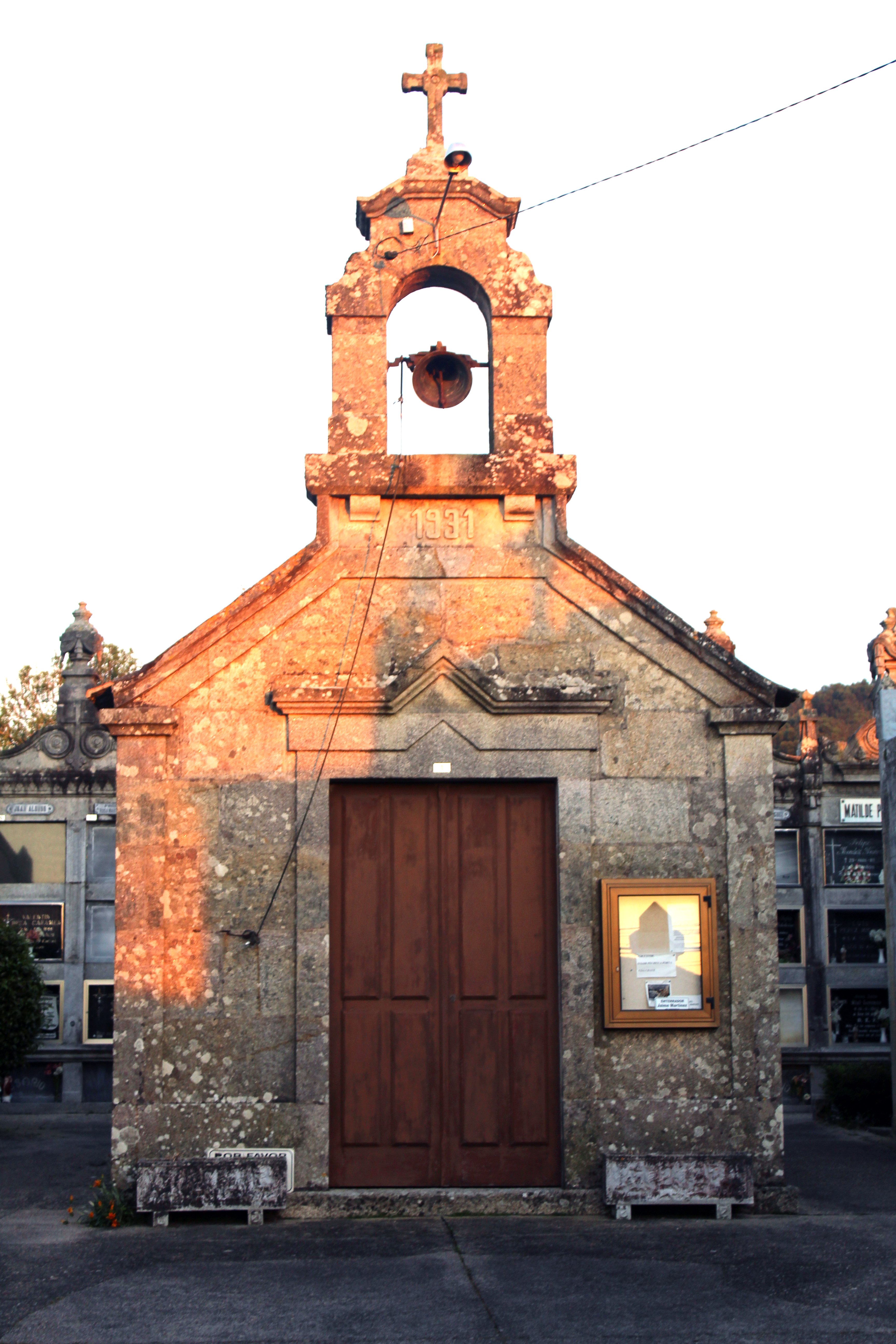 Capela Cemiterio de Crisitllón, Mañufe, Gondomar